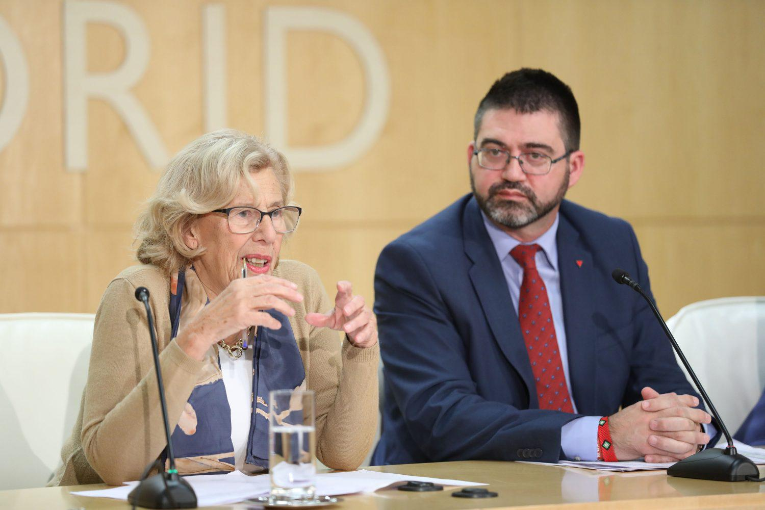 El Ayuntamiento de Madrid comunicó a última hora de ayer las medidas adoptadas en cumplimiento de la resolución del Ministerio de Hacienda y Función Pública de 6 de noviembre de 2017. Se procede a la retención de créditos por valor de 173.597.110,24 euros que no impedirán la realización de los proyectos comprometidos. Quedan garantizadas todas las subvenciones, ayudas y servicios sociales municipales para los titulares actuales y potenciales de los mismos.